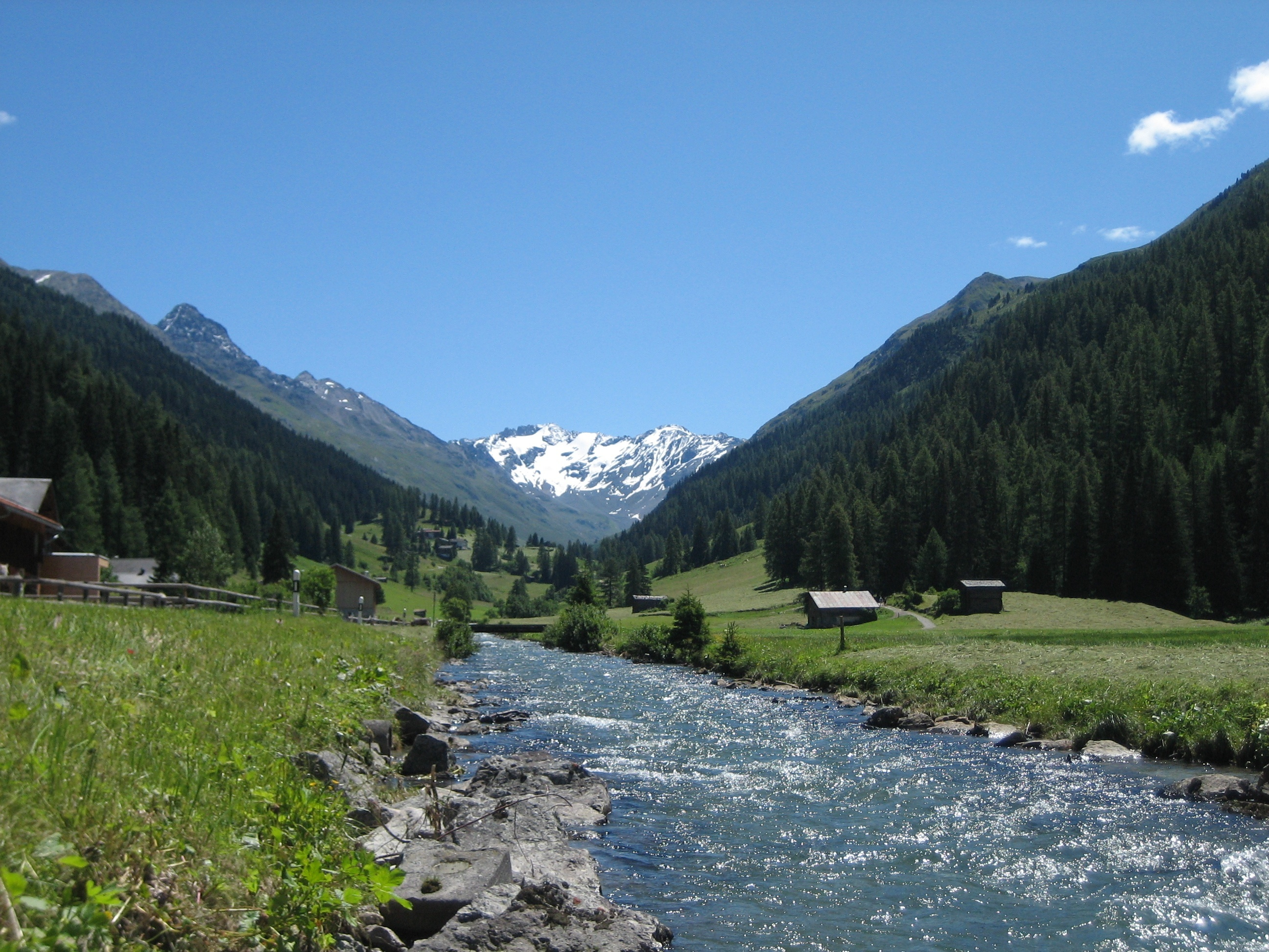 Im Dischma, links das Flüela Schwarzhorn und im Talhintergrund Piz Grialetsch (3131 m) und Scalettahorn (3068 m), davor der Scalettagletscher.